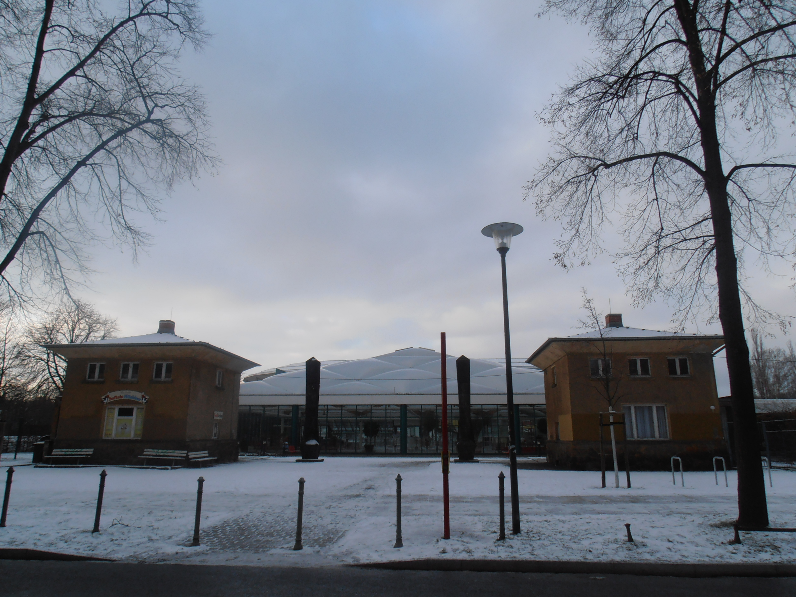 Georg-Arnhold-Bad von NO mit Torhäuschen & Stelen